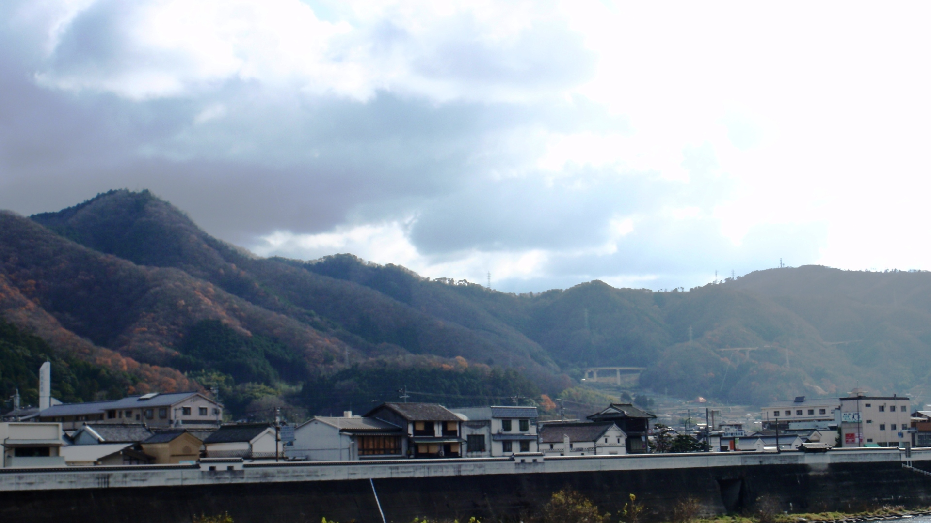 岡山県高梁市にある山で、左手前が愛宕山、右奥が鶏足山。高梁テレビ中継局のうち、愛宕山にUHF局、鶏足山にはVHF局とFM局が置かれている。